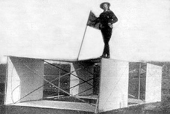 Samuel Franklin Cody auf einem Lawrence Hargrave boxkite (Kastendrachen) Sonstiges: lizenzfrei